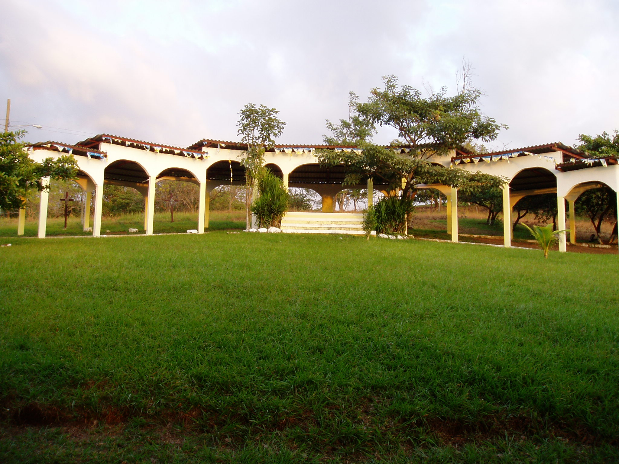 Santuario de Cuapa